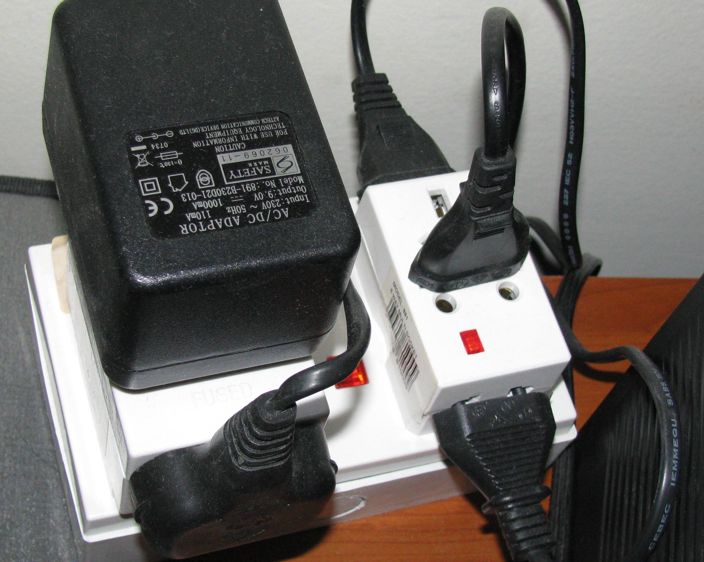 അമിതവൈദ്യുതഭാരം - വൈദ്യുതപഥത്തിന്റെ ശേഷിപരിഗണിക്കാതെ നിരവധി ഉപകരണങ്ങൾ ഘടിപ്പിച്ചിരിക്കുന്നു - സാധാരണകണ്ടുവരുന്ന ഒരു രീതി.